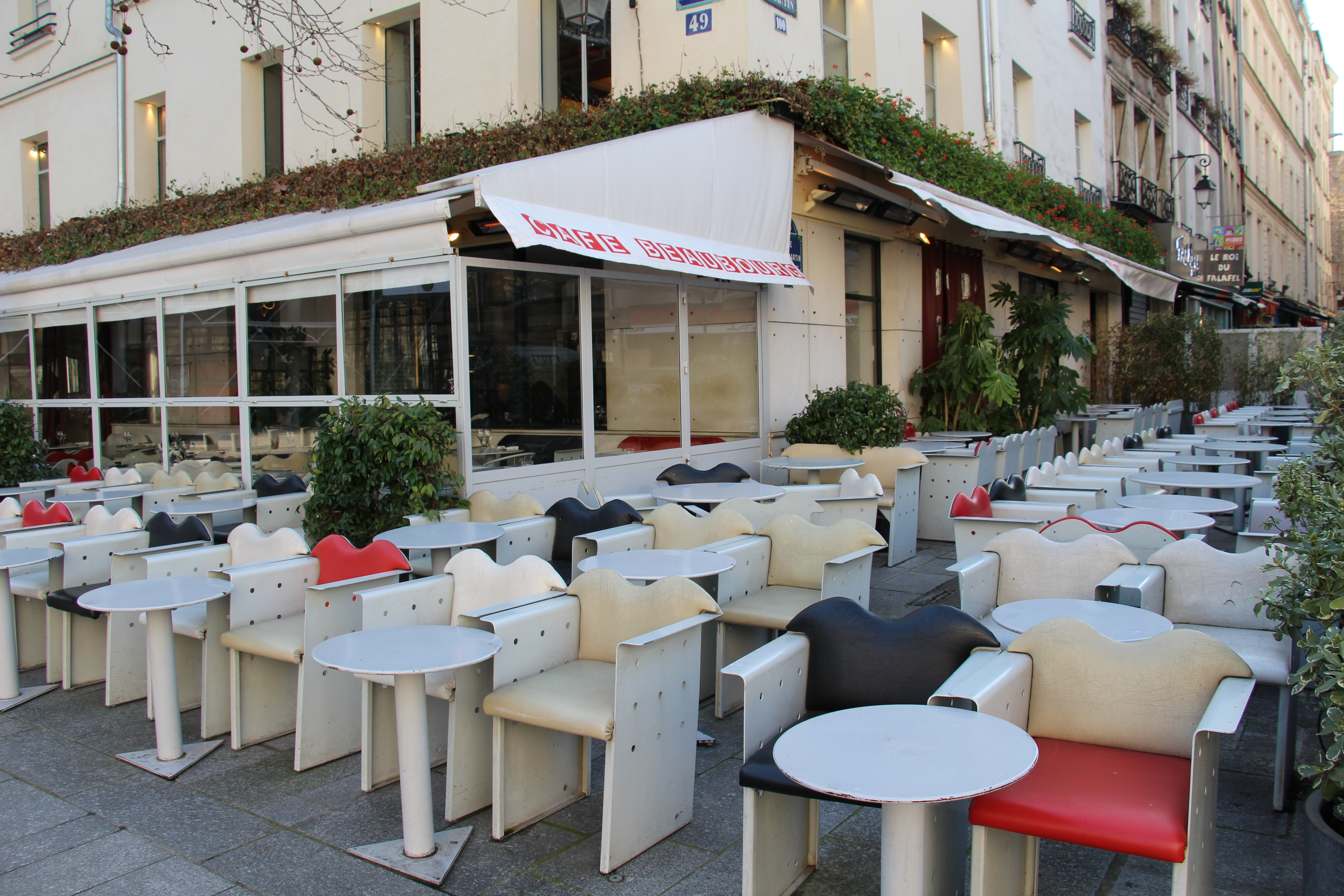 (Saint-Merri) Place Georges-Pompidou Café nearby the Centre National d’Art et de Culture Georges-Pompidou (CNAC). Arch. Christian de Portzamparc 1985-87.